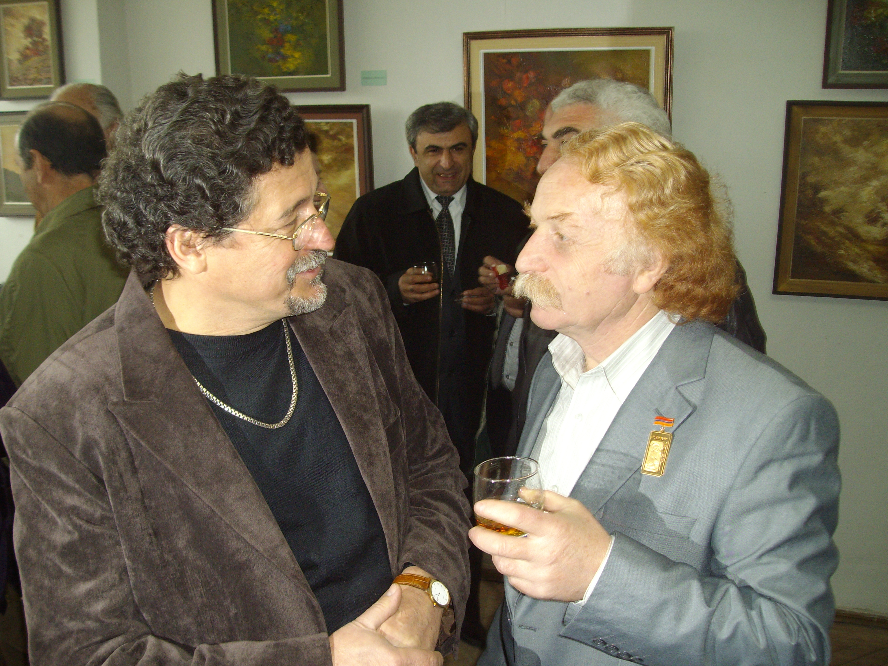 Անատոլի Ավետյան և Փափագ Ալոյան